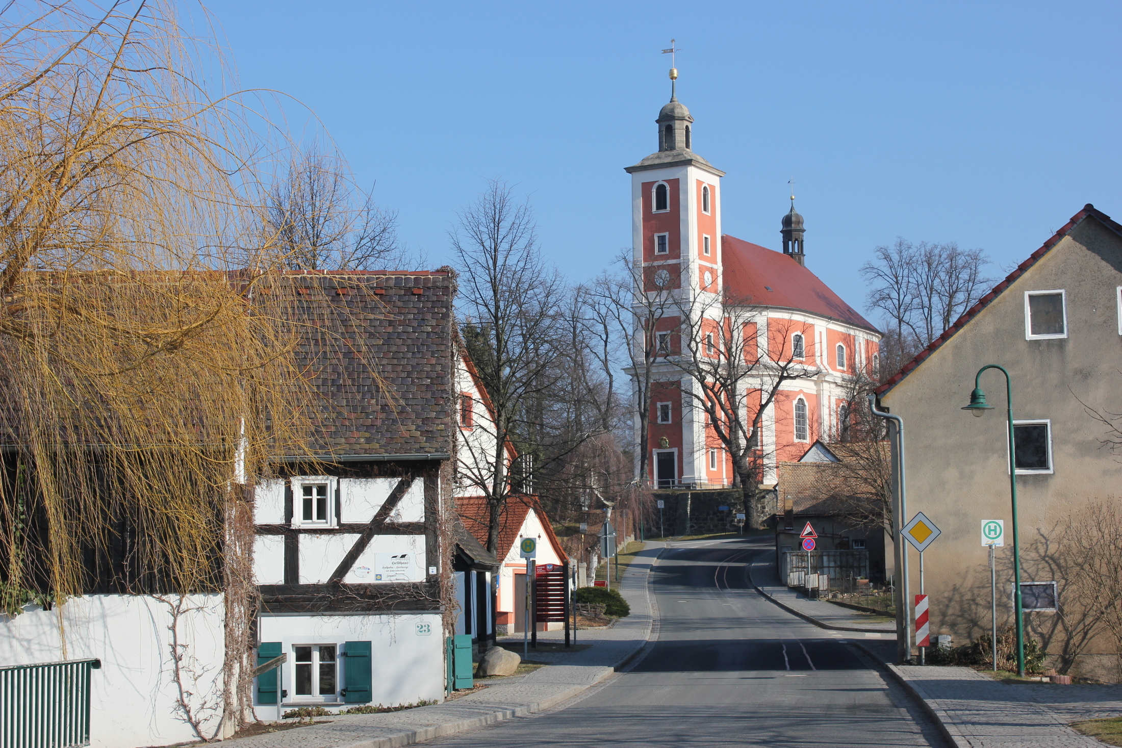 Hornjoserbsce: Njebjelčicy; na Hłownej dróze.